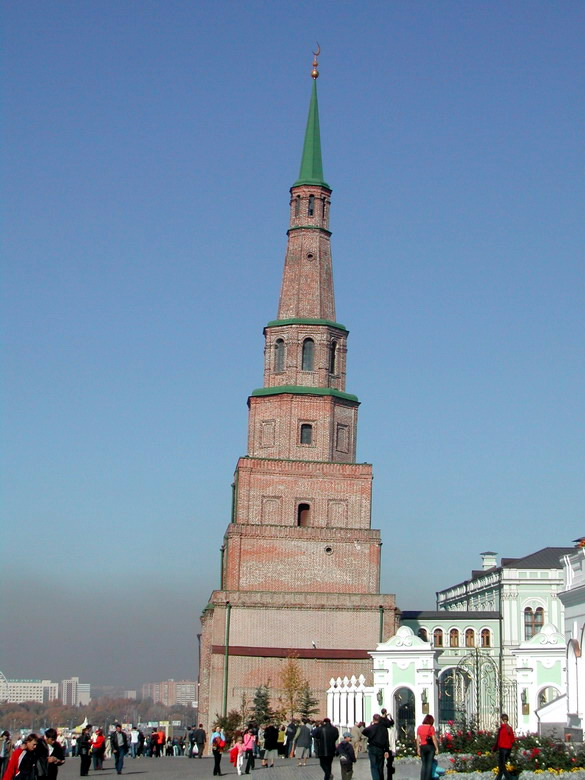 Башня Сююмбике в Казанском кремле, г. Казань, Татарстан, Россия